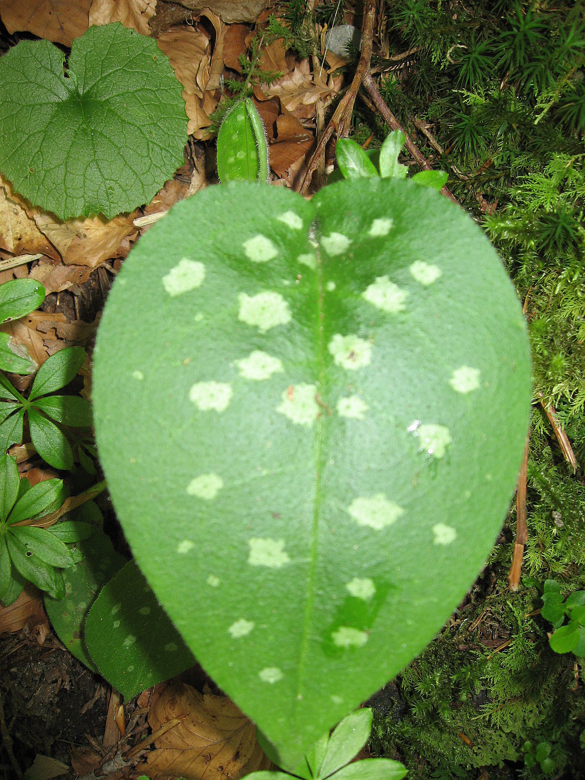 Pulmonaria officinalis